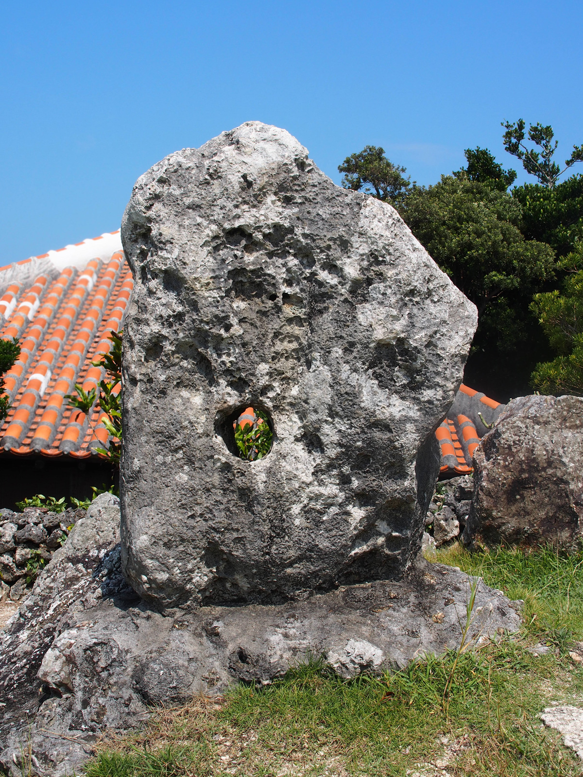 星見石（沖縄県竹富島）